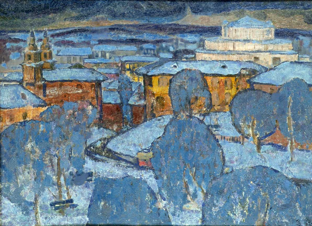 Борис Аракчеев, СИНИЙ ЗИМНИЙ ВЕЧЕР, 1967, холст, масло, 100 х 135 см